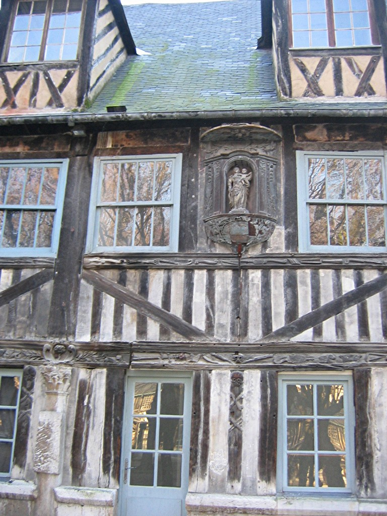 Aître Saint-Maclou, Rouen, Seine-Maritime/ Photographie personnelle prise par Urban, décembre 2004/ GFDL Urban